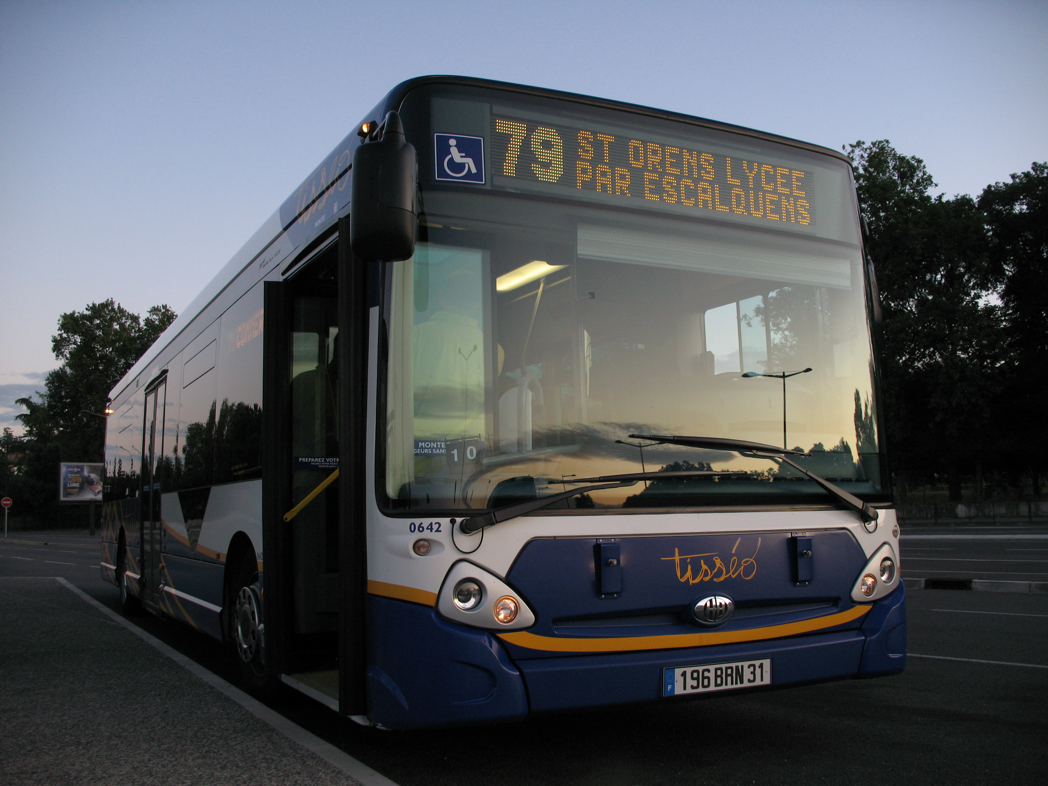 Bus Heuliez GX 327 sur la ligne 79 à la station Université Paul Sabatier.